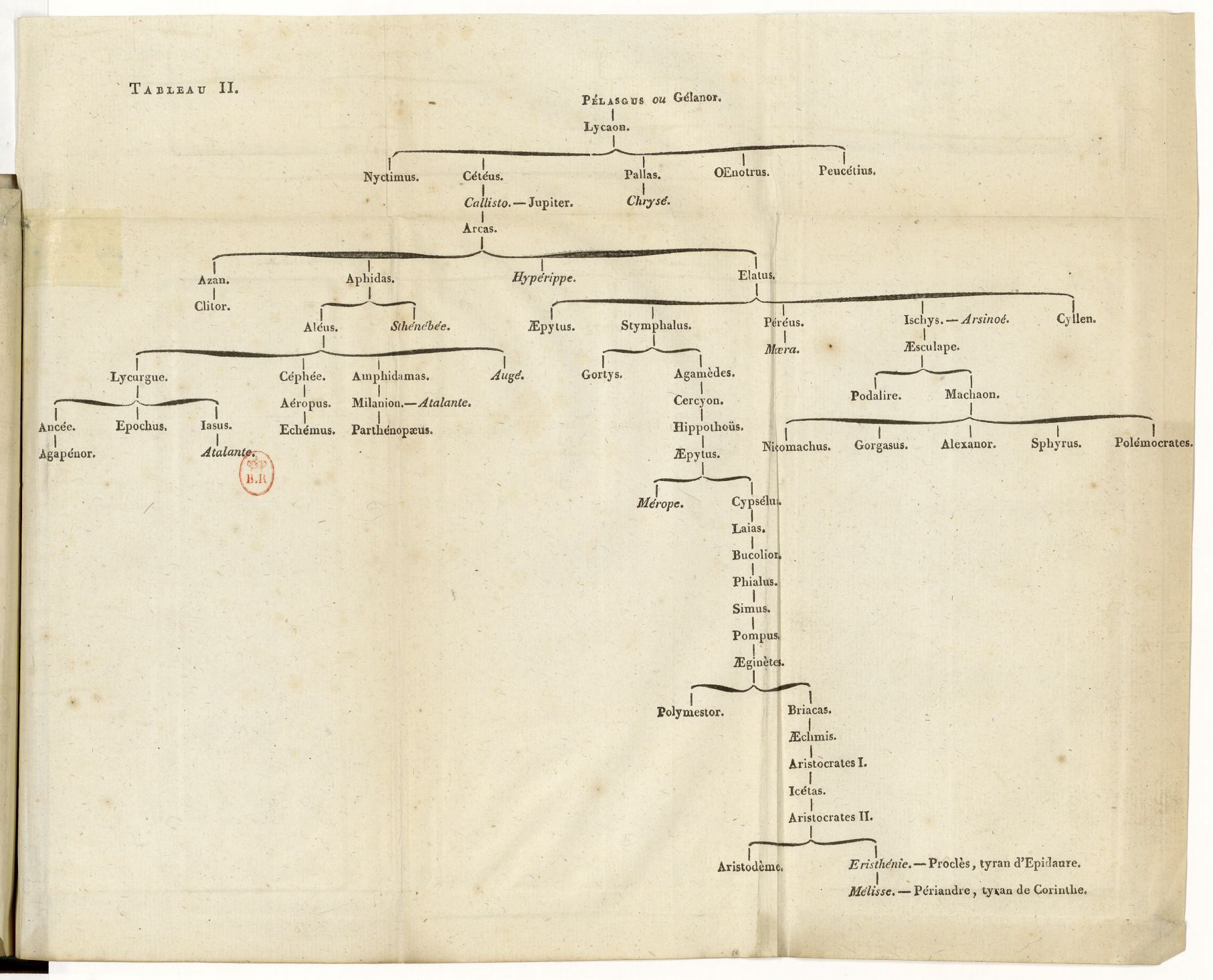 Tableau généalogique n°2